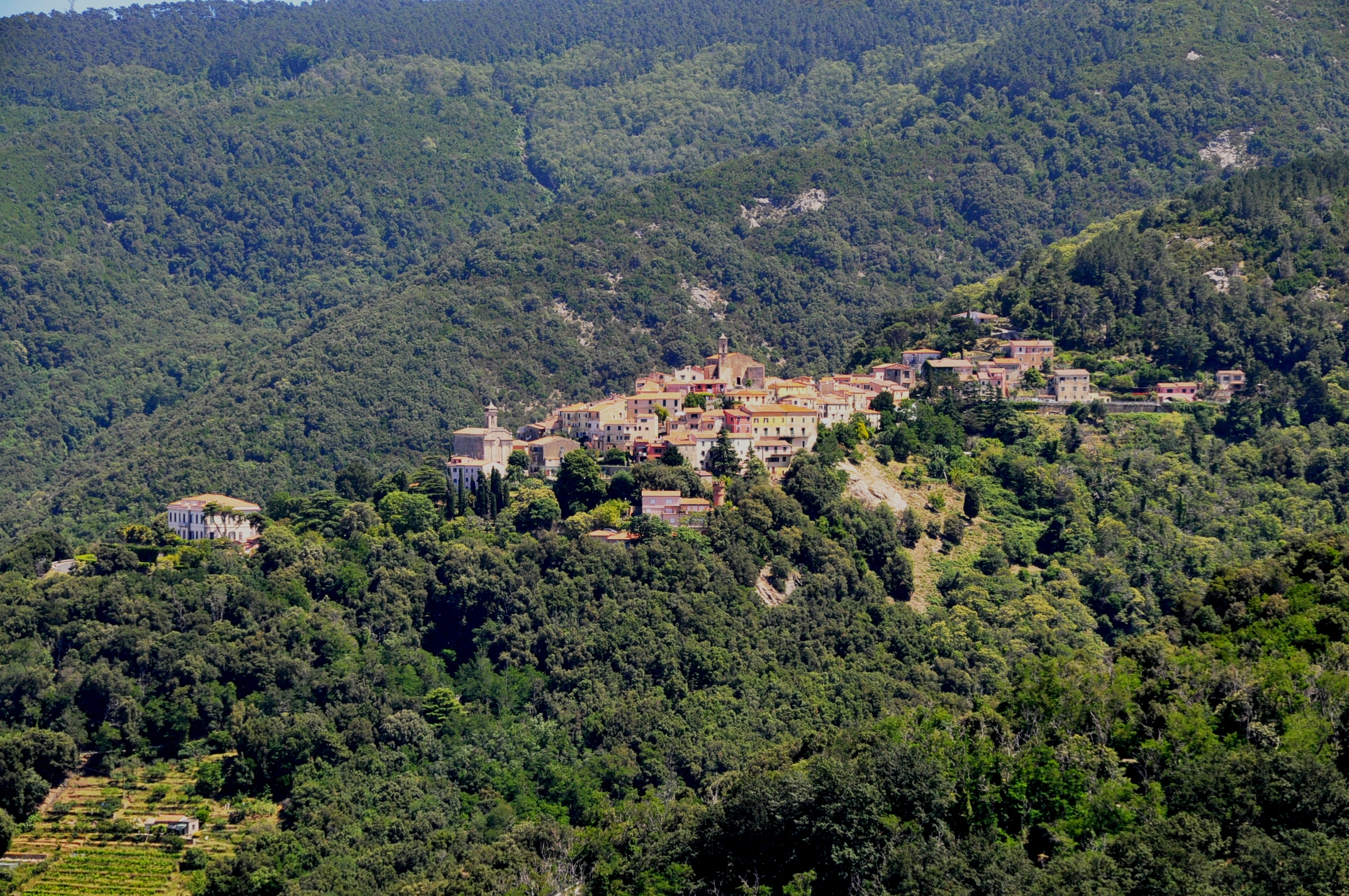 Poggio aus Westen